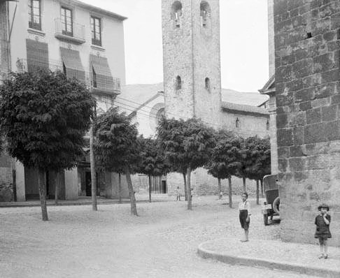 Església de Sant Domènec de la Seu d'Urgell. Rafael Degollada i Castanys (Entre 1912 i 1924)